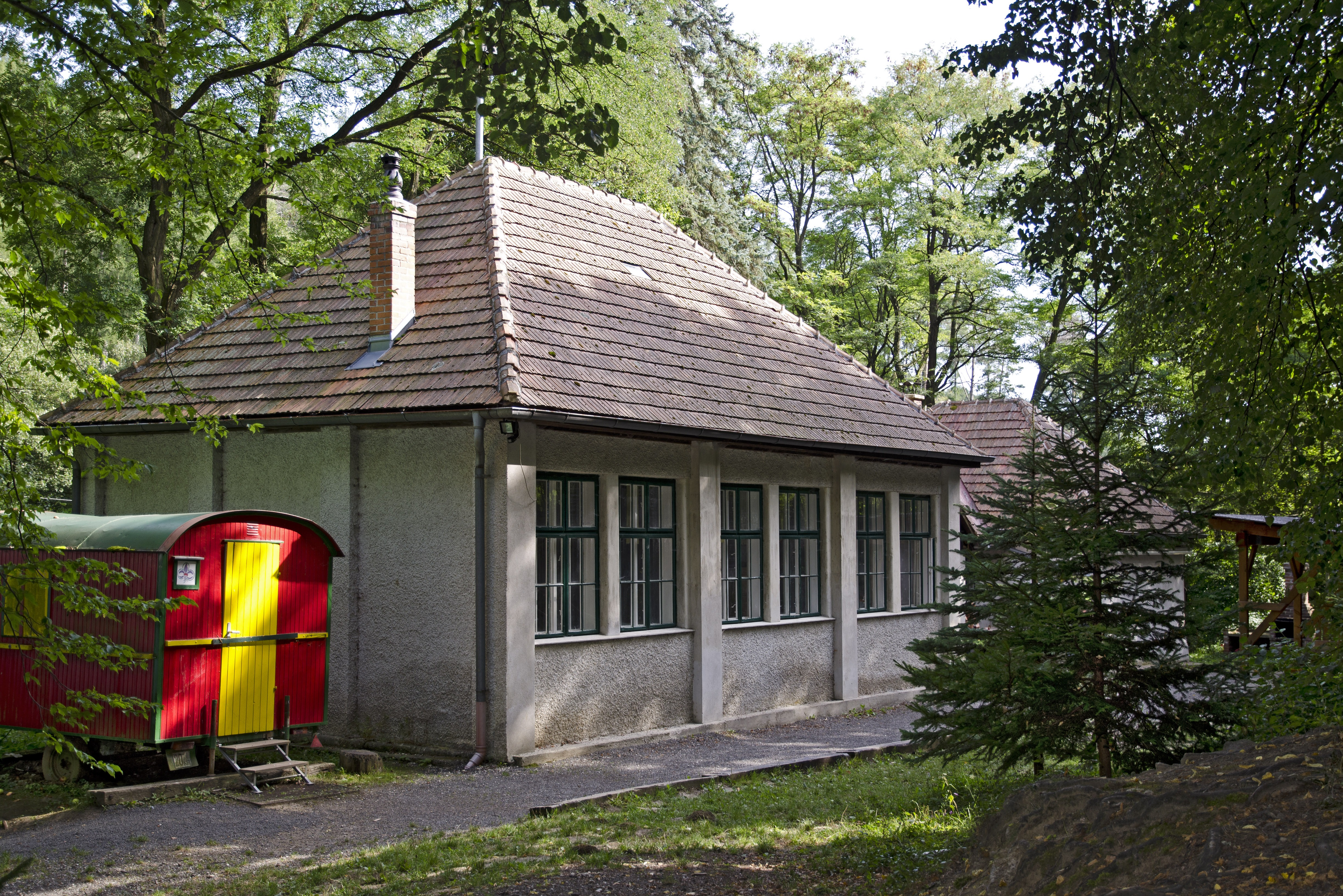 Ritzing, Kolonie Helenenschacht, Waldschule